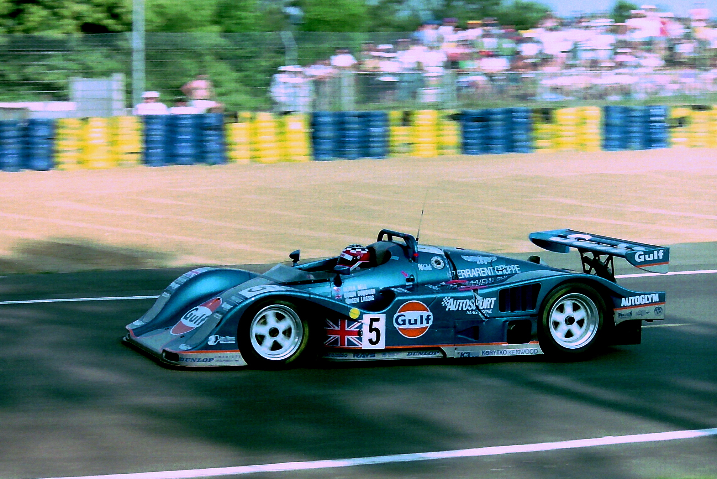 Kremer K8 - Derek Bell, Jurgen Lassig & Robin Donovan in the Esses at the 1994 Le Mans